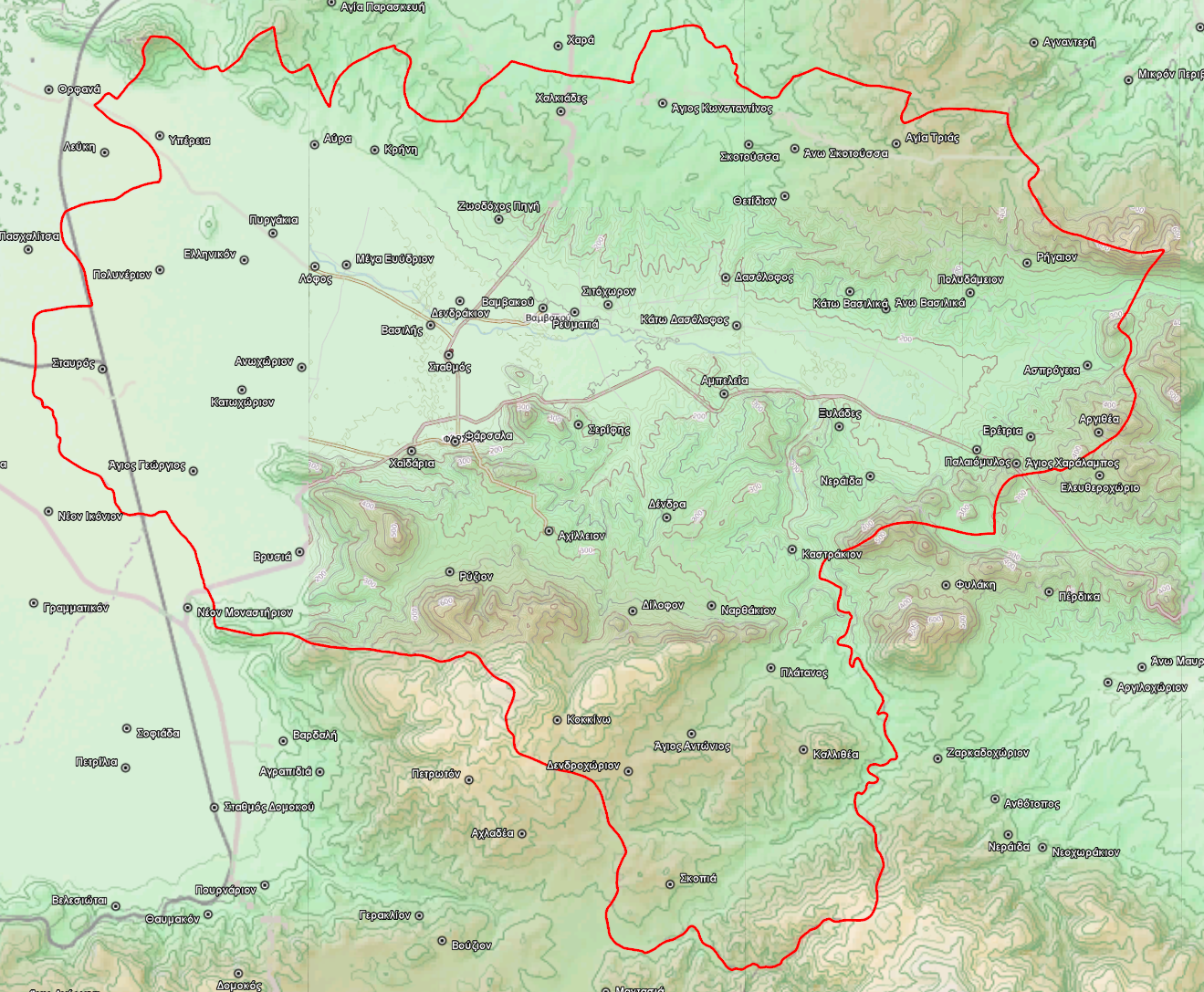 Τοπογραφικός χάρτης του Δήμου Φαρσάλων